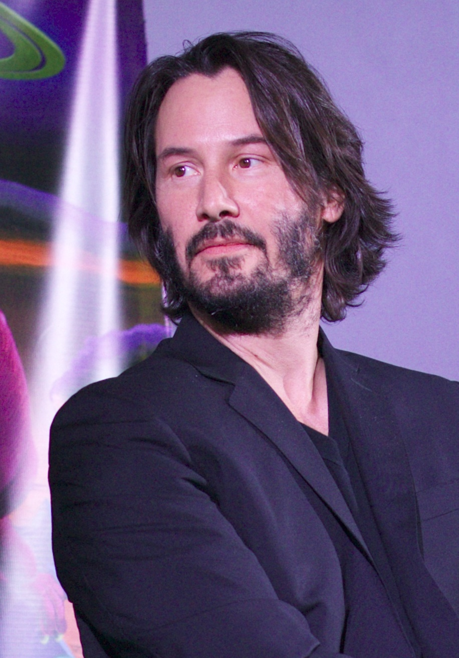 Keanu Reeves & Tiger Chen & Tim League